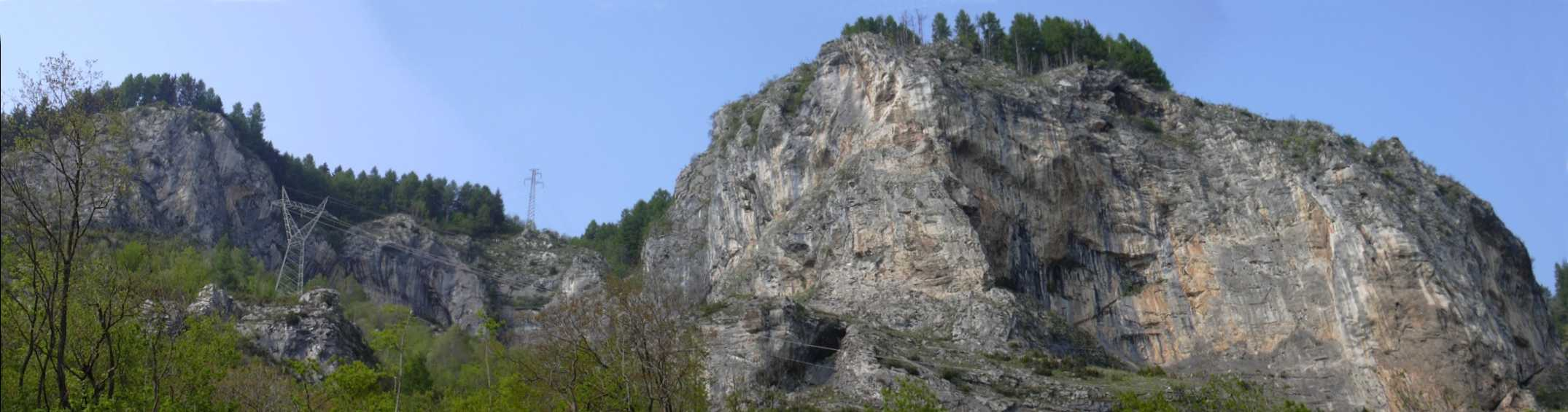 Falesia di arrampicata di Andonno